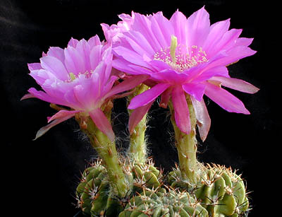 Echinopsis rojasii